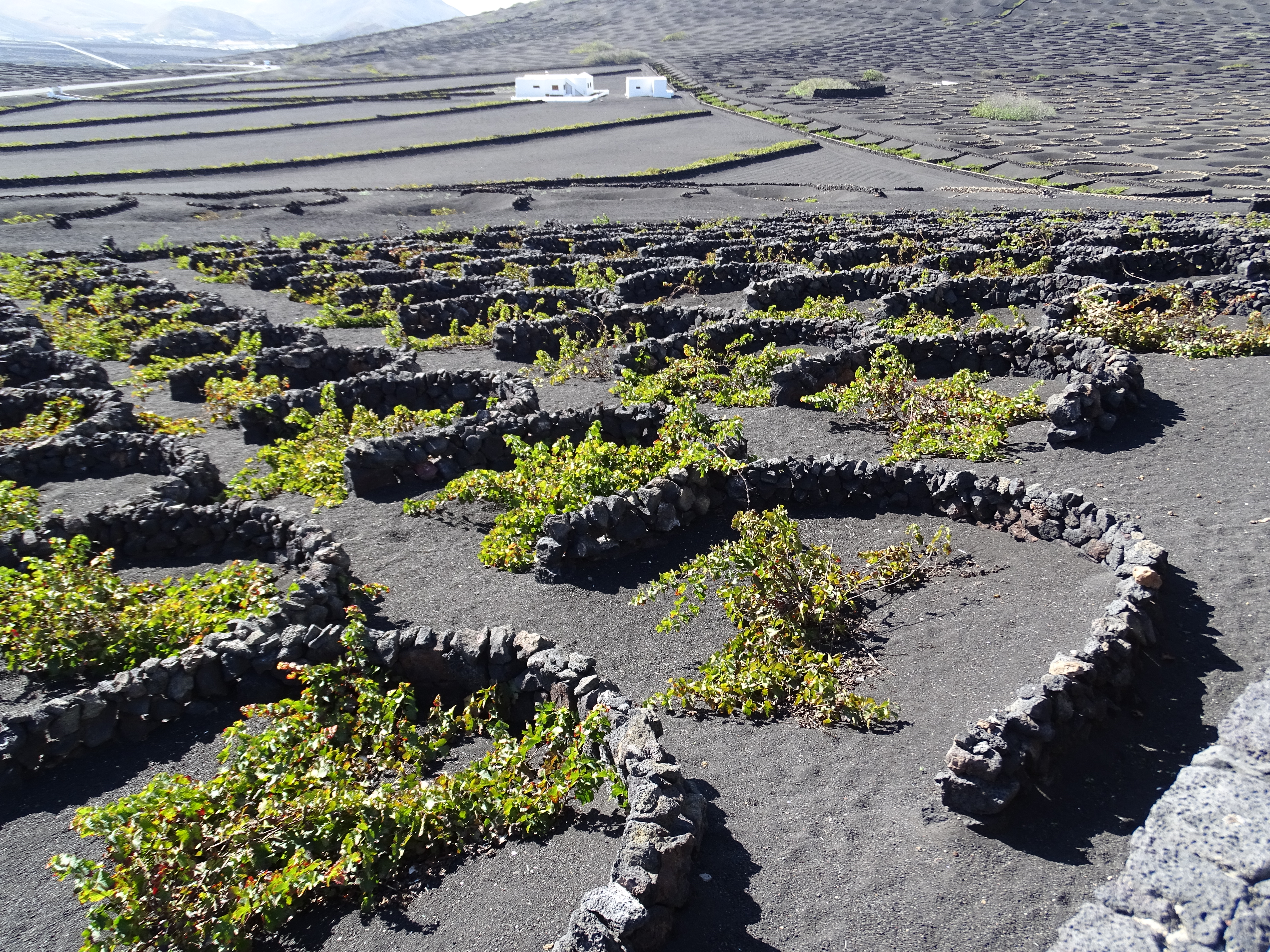 Weinfelder im Anbaugebiet La Geria, Lanzarote, Kanarische Inseln, mit den typischen halbkreisförmigen Mauern aus basaltischem Lavagestein, jeweils nur für eine Pflanze